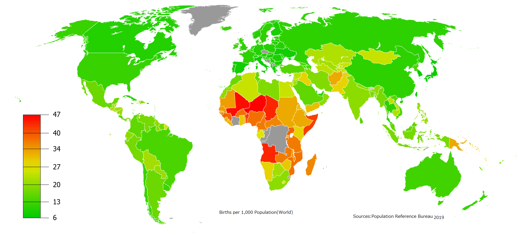 国・地域別の人口1000人当たりの出生率